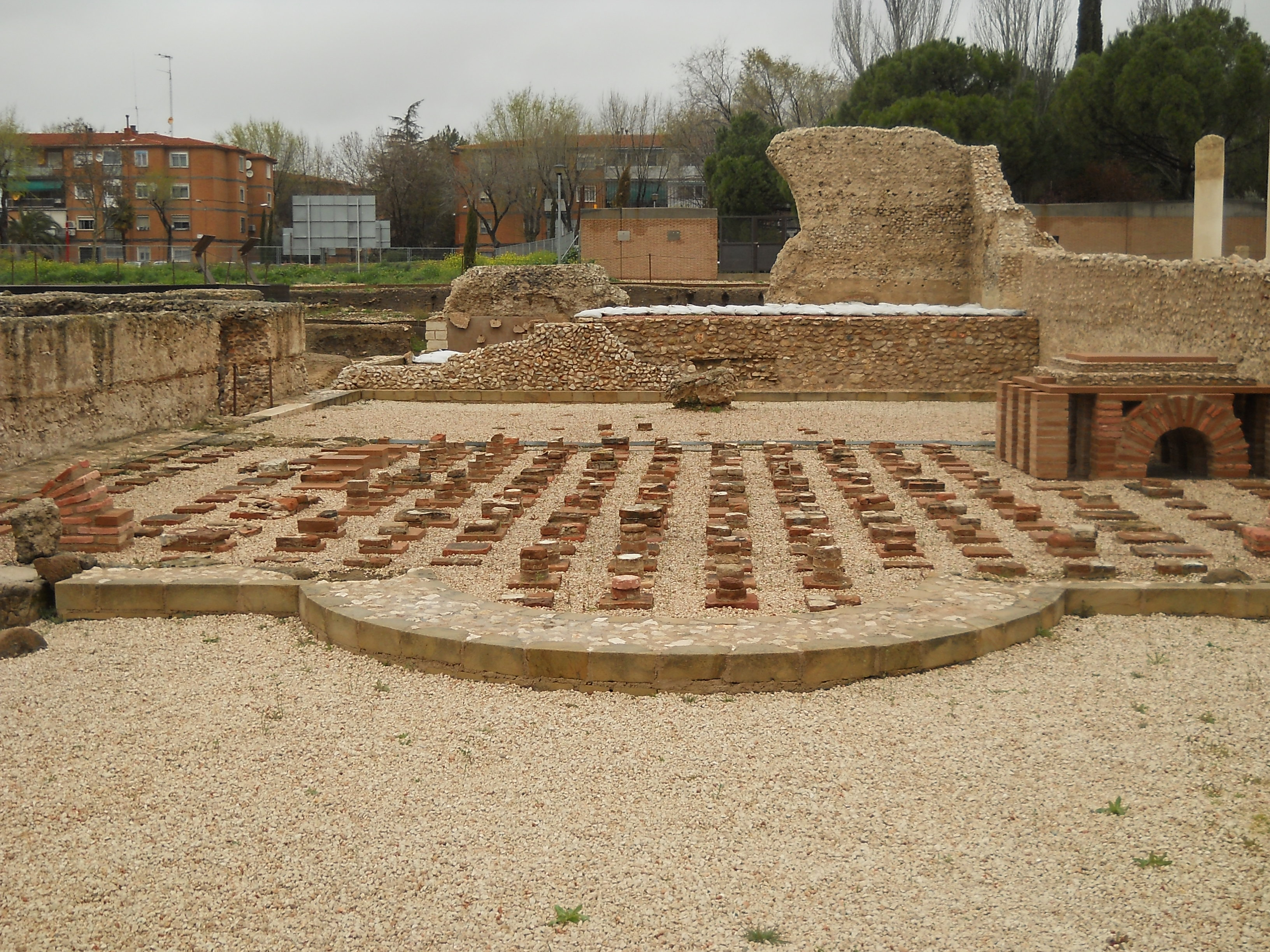 Termas, Yacimiento de Complutum, Alcalá de Henares, Madrid, España